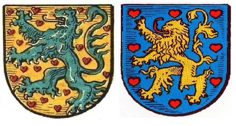 Zeitgenössische Zeichnungen des Stadtwappens Winsen an der Luhe. Links die Abbildung von einer Sammelmarke Anfang des 20. Jahrhunderts mit der ursprünglichen, aber damals schon veralteten Tingierung. Rechts das Stadtwappen Winsen an der Luhe nach der Farbumkehr, aus einer Publikation für regionale Zeitgeschichte mit der heute gültigen Tingierung.